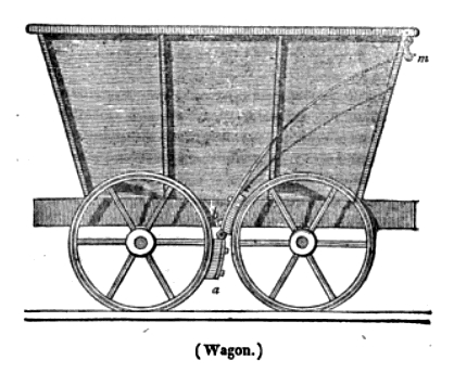 dessin